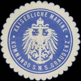 Sealing stamp Title: K. Marine Kommando S.M.S. Graudenz Description: Schiff Place: size: cm